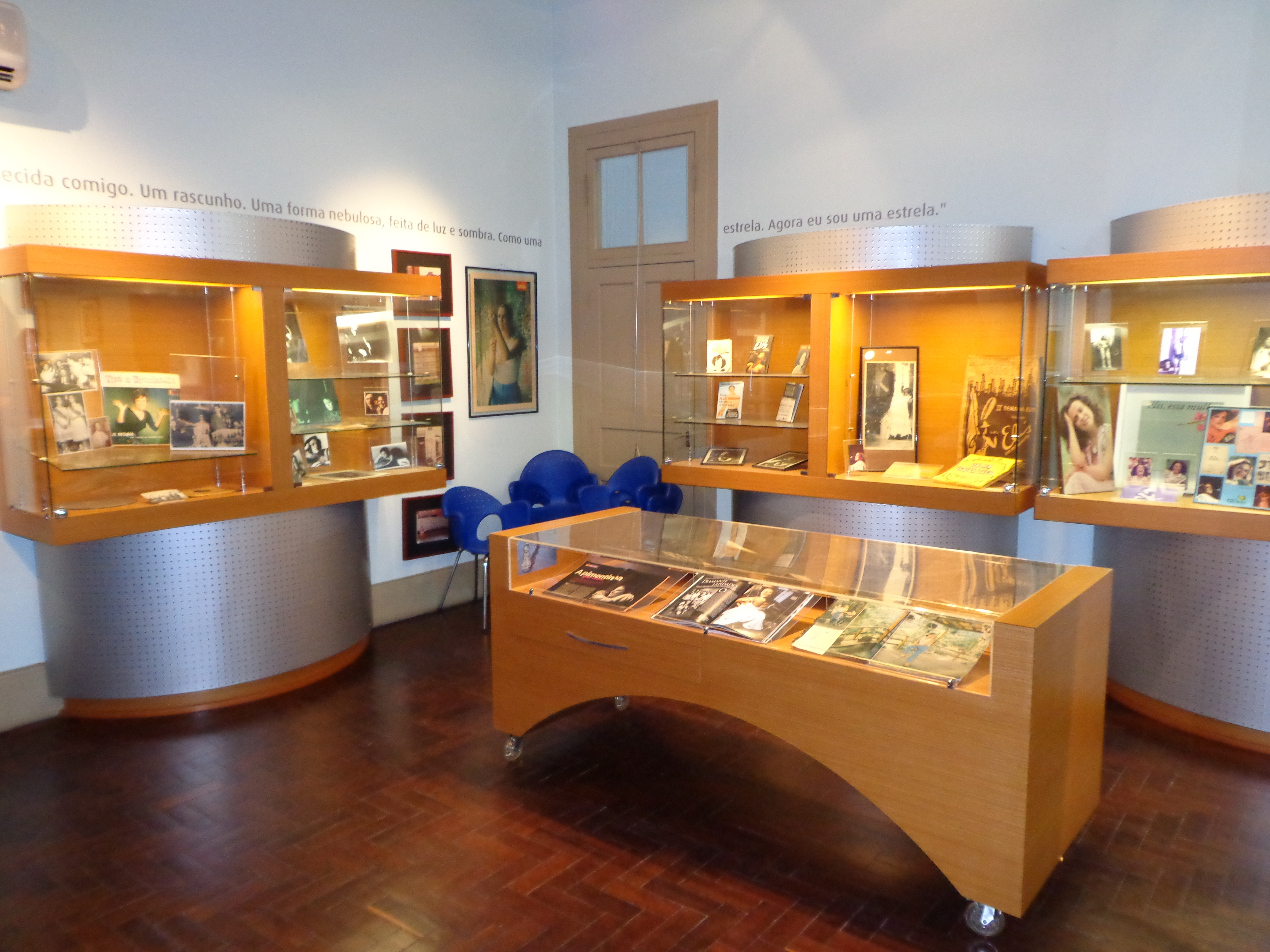 Acervo Elis Regina, no 2.° andar da Casa de Cultura Mario Quintana, em Porto Alegre, RS.